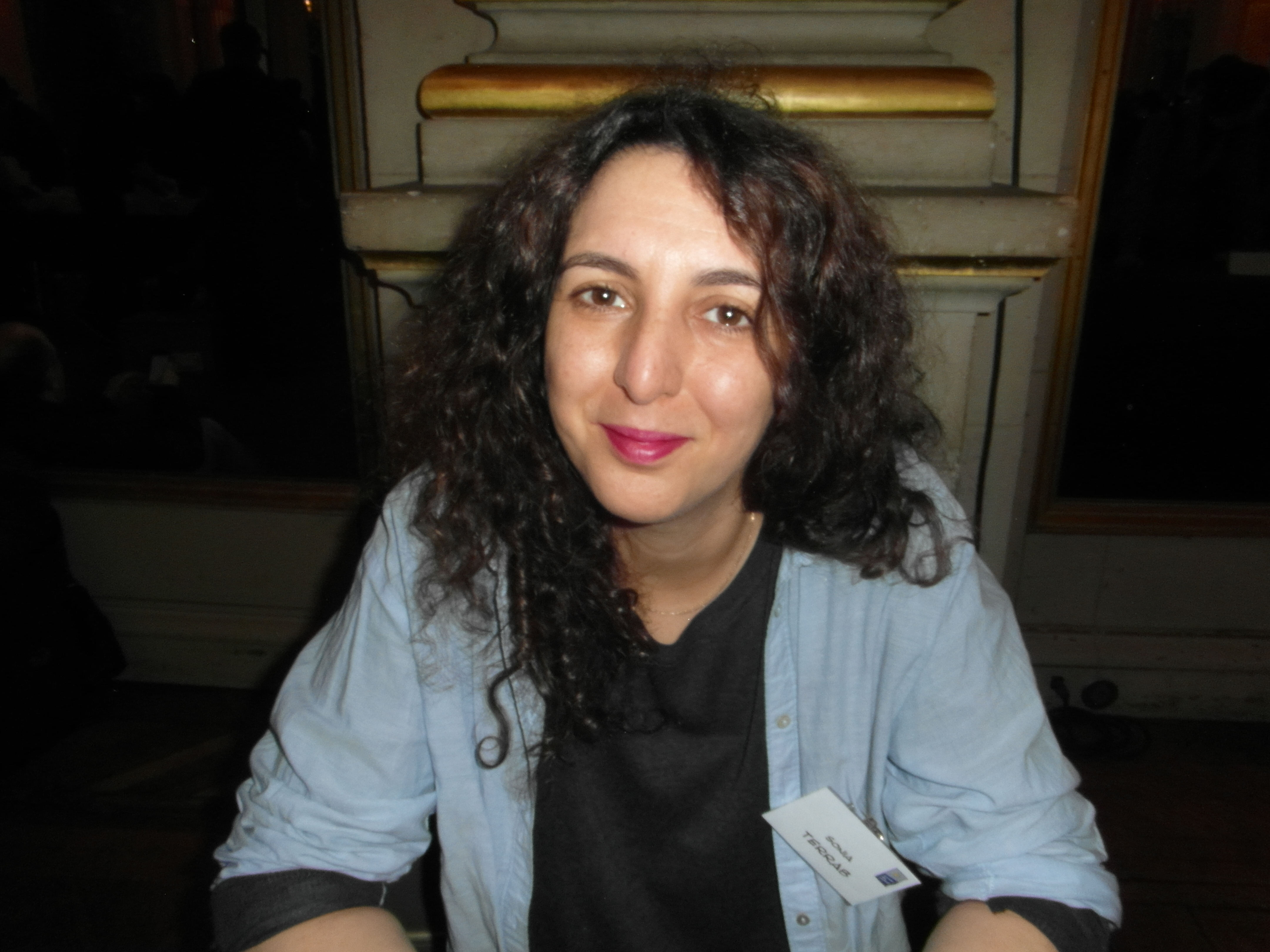 22e Maghreb des Livres, 13 et 14 février 2016